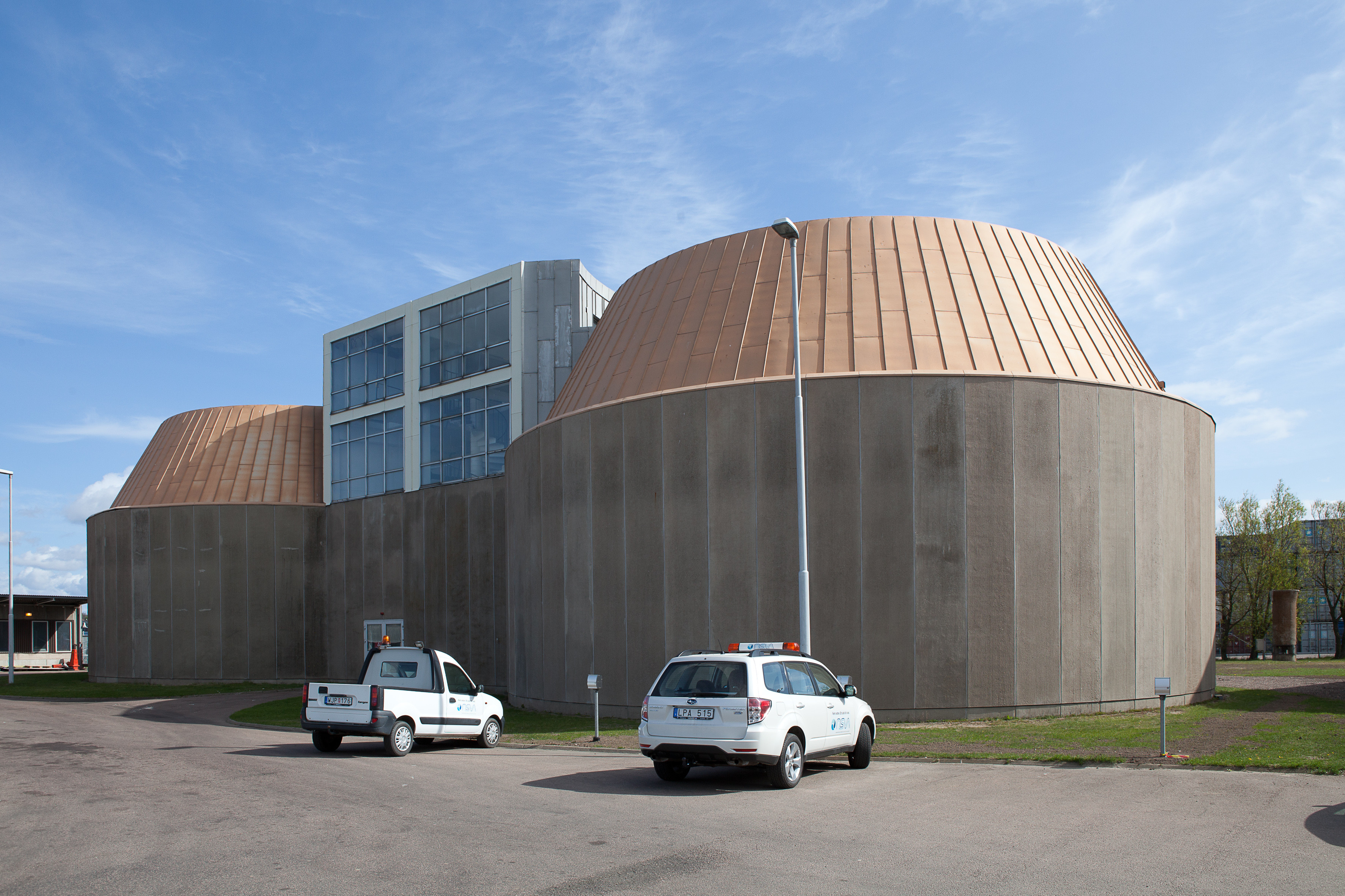 Öresundsverkets rötkammare.